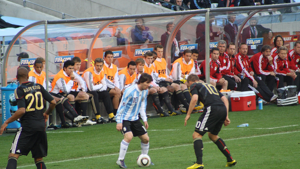 Lionel Messi, Lukas Podolski and Jerome Boeteng. Background: German bench with Dennis Aogo, Stefan Kießling, Serdar Tasci, Marko Marin, Hans-Jörg Butt, Mario Gomez, Piotr Trochowski, Holger Badstuber, Toni Kroos, Cacau, Marcell Jansen, Tim Wiese, and staff.